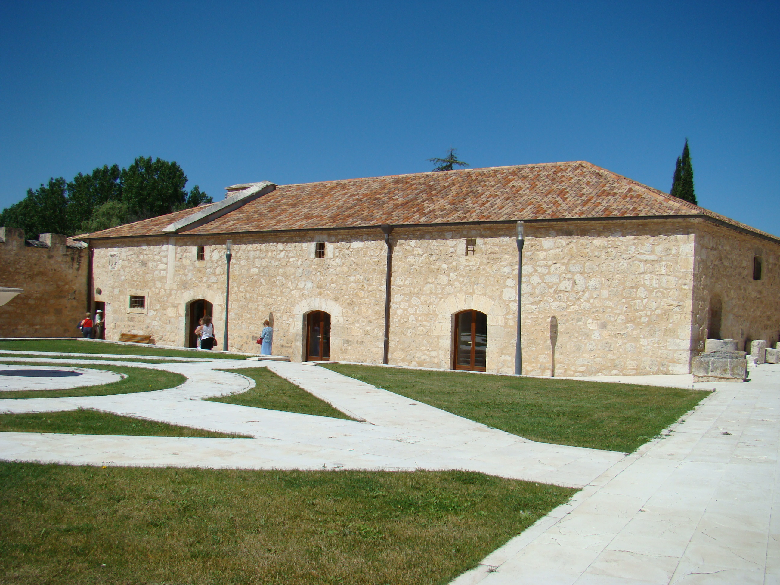 Valbuena de Duero, Valladolid, España. Monasterio de Santa María de Valbuena. Patio del Compás.